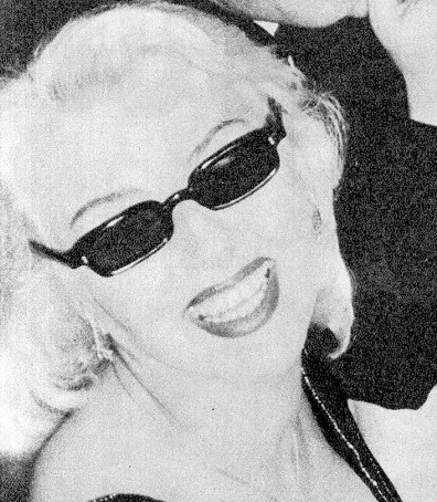 photo from L'Espresso (1956)